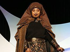 Luminara Unduli cropped